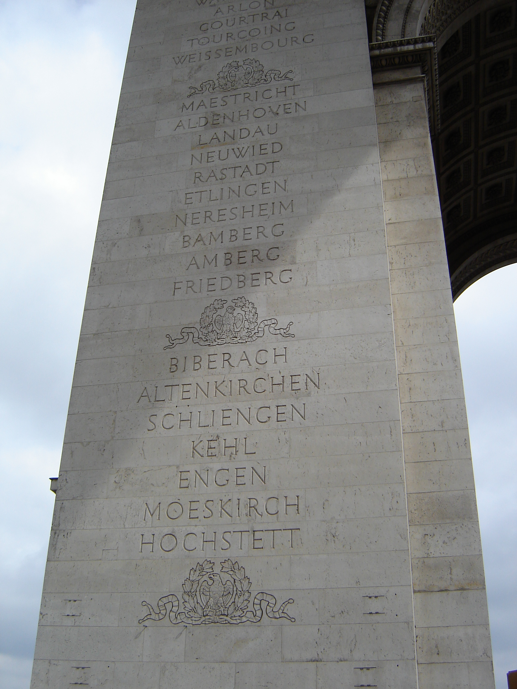 Detailaufnahme von Arc de Triomphe (:Bild:Arc de Triomphe 2007.JPG) in Paris